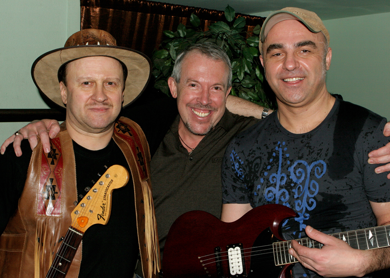 А.Белов, А.Макаревич, Л.Ломидзе после концерта